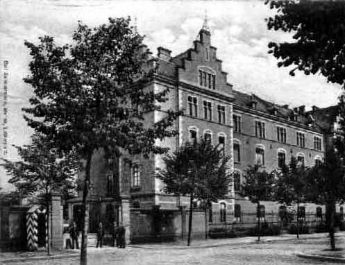 Kaserne des Infanterie-Regiments „Prinz Carl“ (4. Großherzoglich Hessisches) Nr. 118 in Worms um 1900